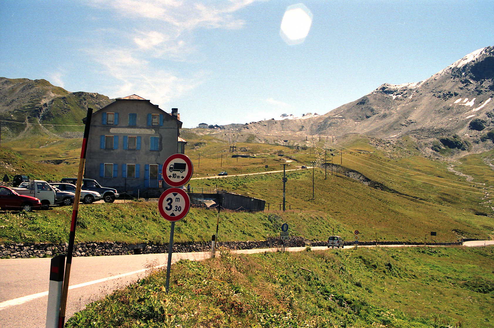 Westauffahrt zum Stilfser Joch, Standort: Einmündung der Straße über den Umbrailpass.